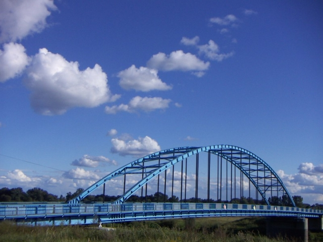 Świerkocin - most nad Wartą